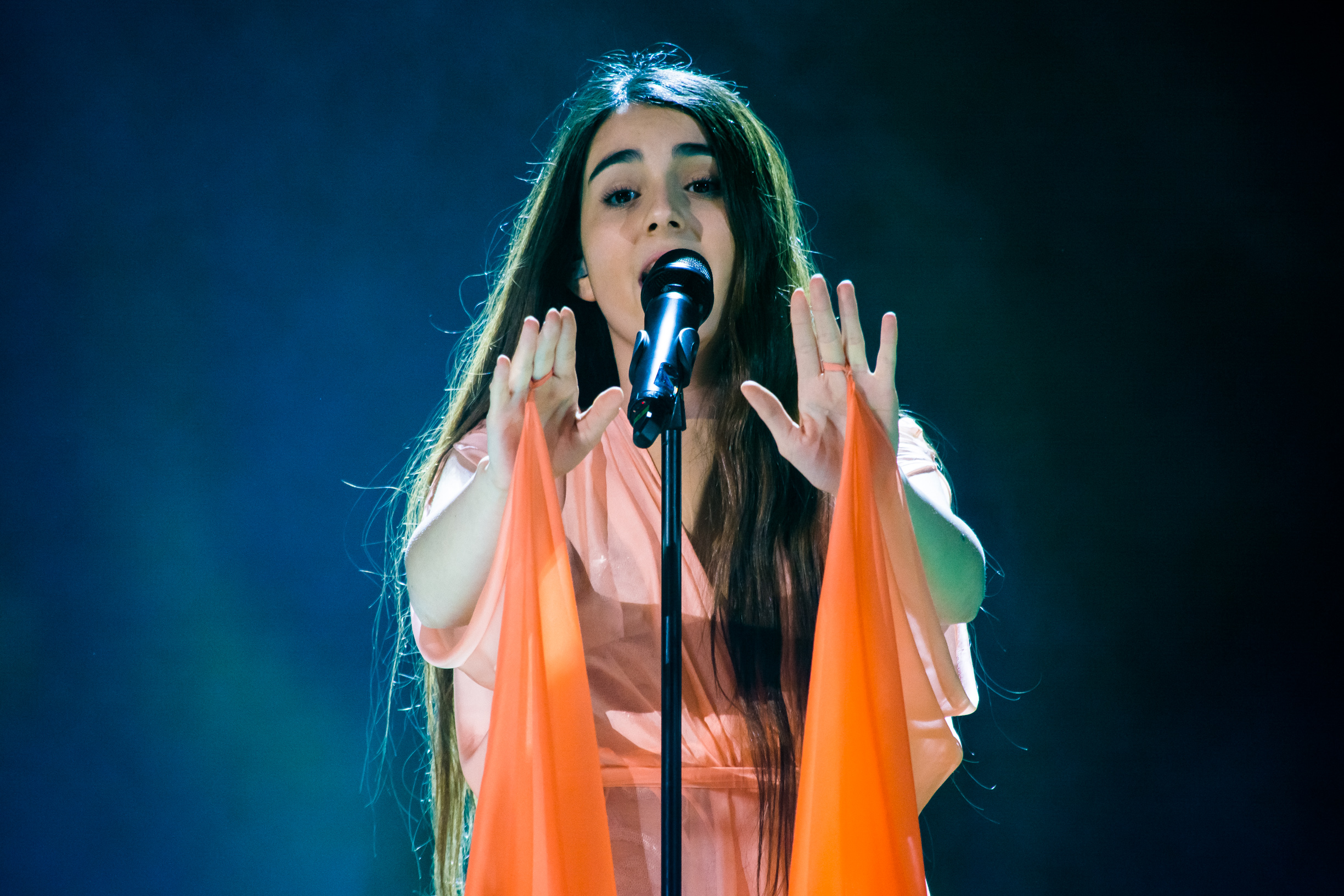 Анна Тринчер на сцене Детского Евровидения 2015 («Армеец», София) во время генеральной репетиции